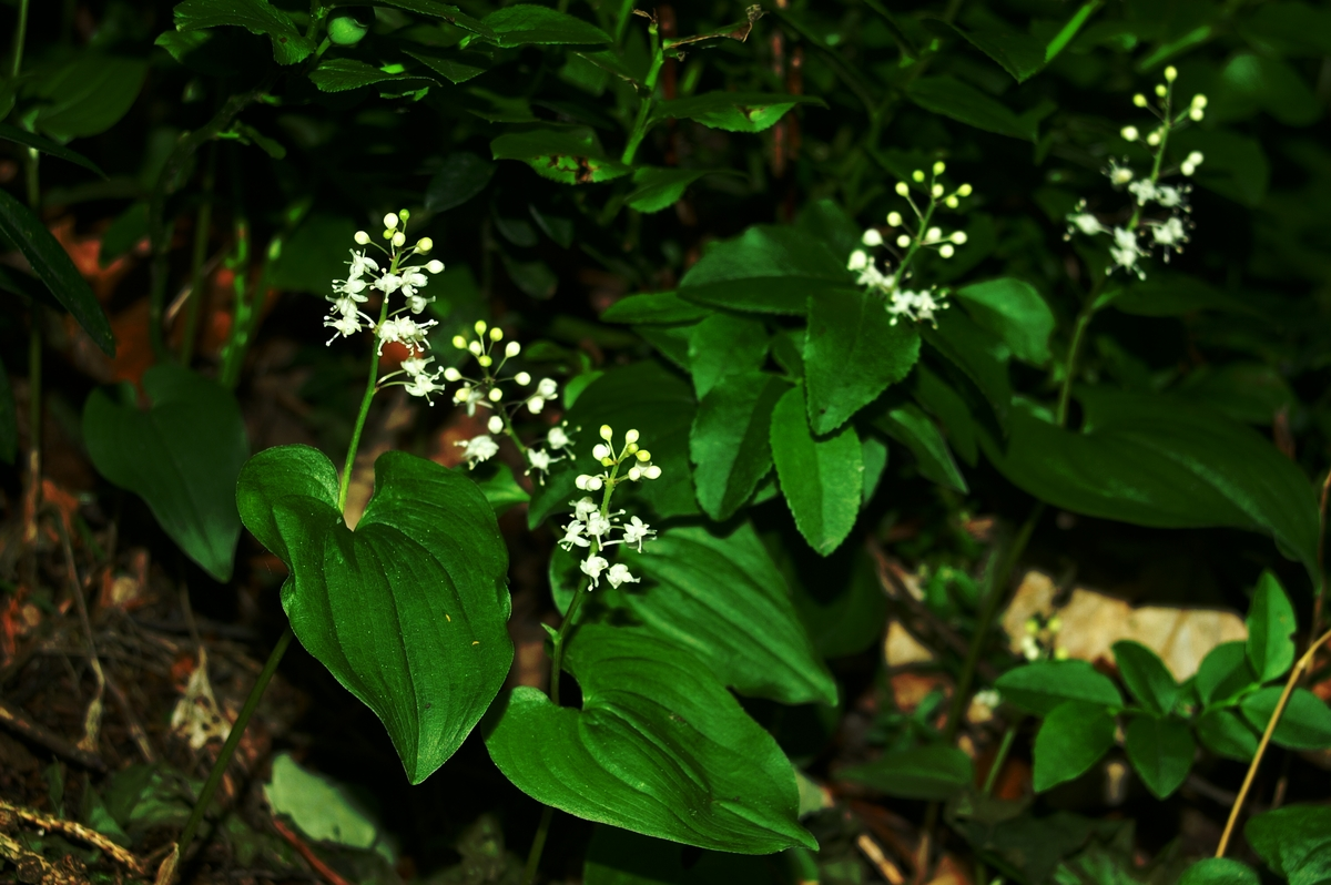 Dvolistna senčnica na Mrzlici.